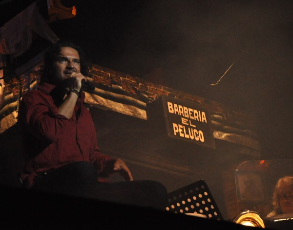 Ricardo Arjona en Argentina Tour 5to Piso